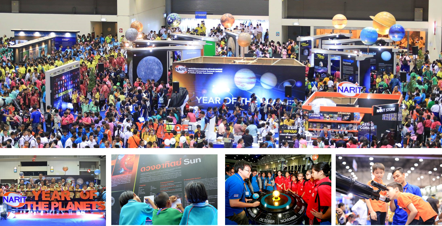 กิจกรรมดาราศาสตร์สำหรับประชาชนในรูปแบบต่างๆ